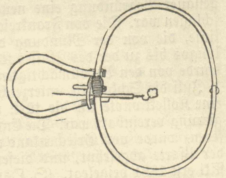 Berliner Eisen in gespanntem Zustand (Selbstscan aus Brockhaus 1908)